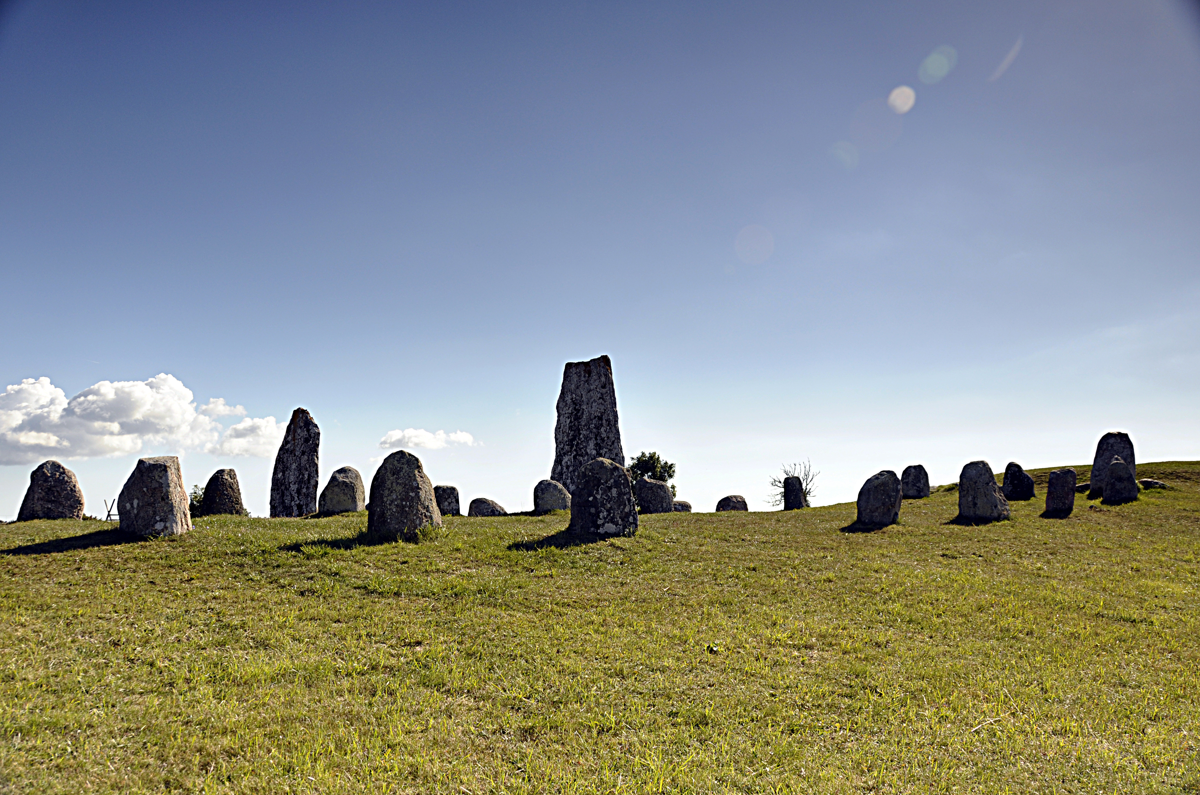 Gettlinge gravfält (Raä-nr Södra Möckleby 10:1) i Gettlinge, Södra Möckleby socken, Mörbylånga kommun, Öland, Kalmar län, Sverige. Gravfältet är 700 m långt.